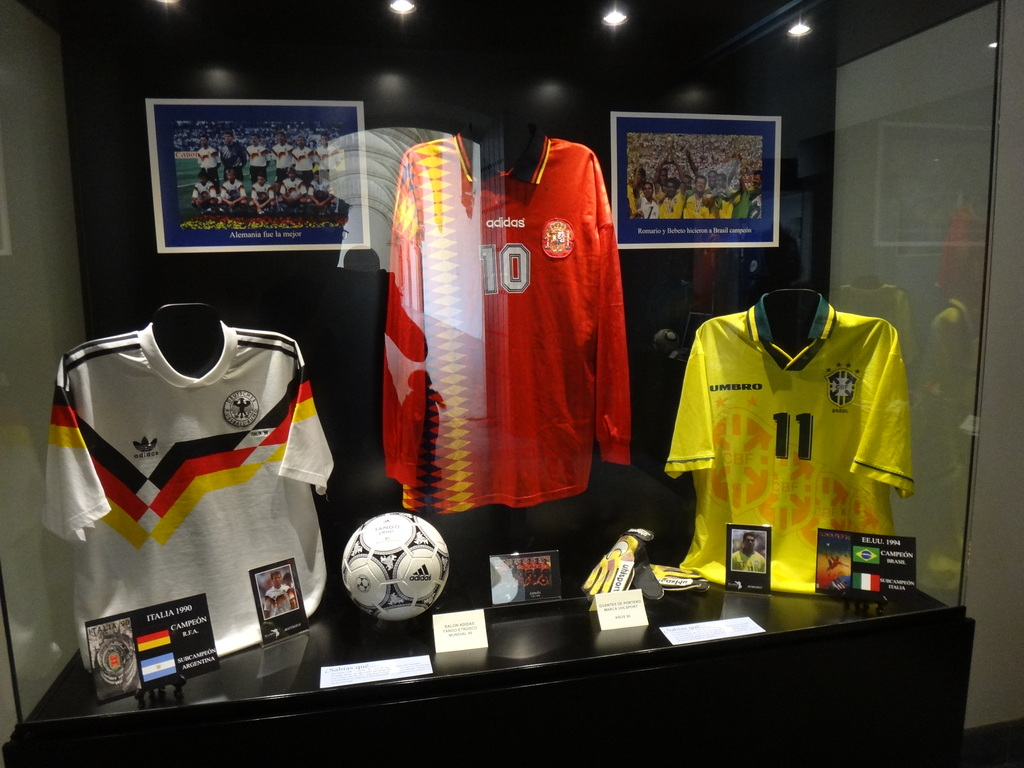 Exposición ‘De Uruguay a Sudáfrica’, Jerez de la Frontera (Andalucía, España)